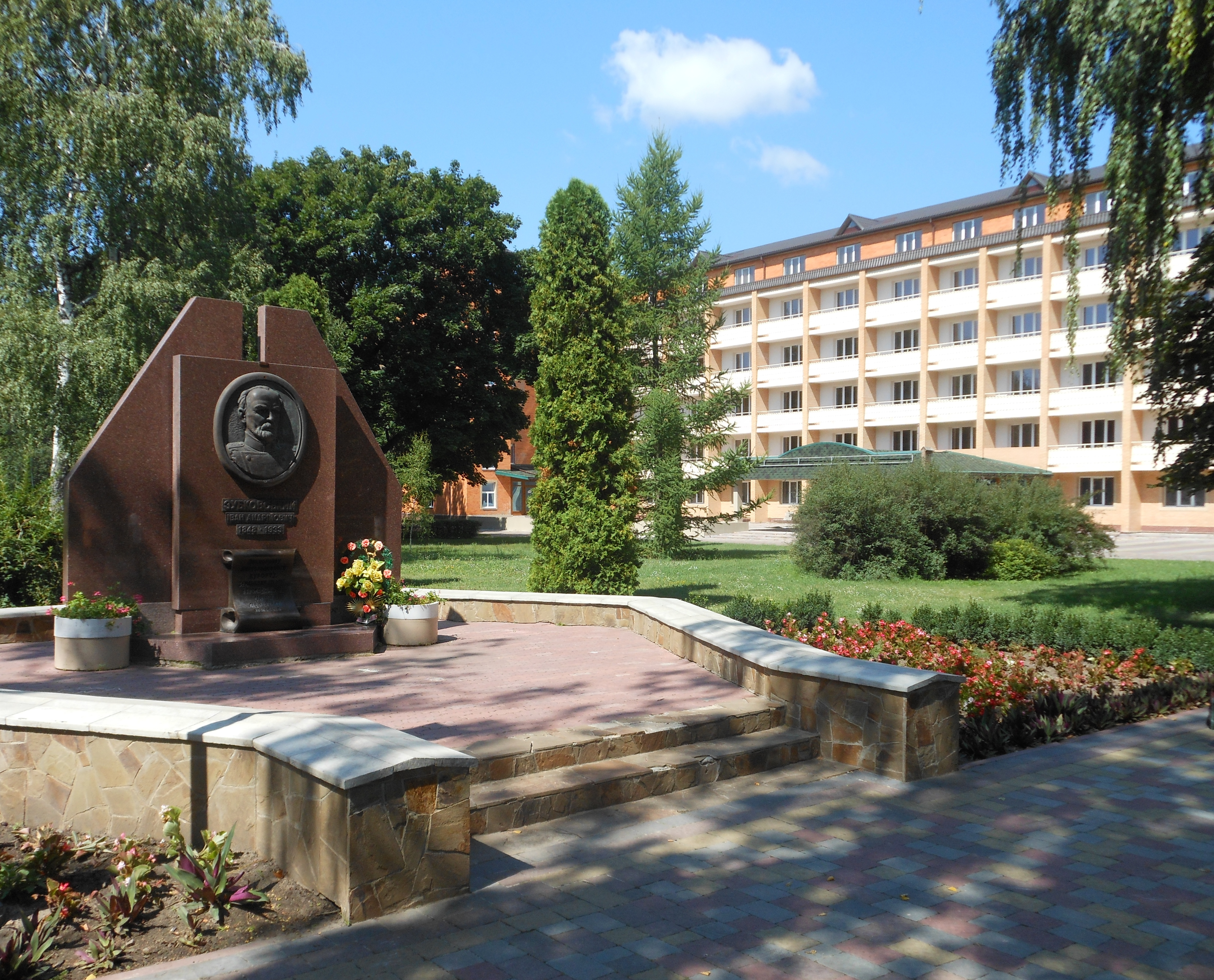 Пам’ятний знак засновнику курорту І.А.Зубковському., Миргород, Гоголя вул. 112, територія ЗАТ “Миргородкурорт”